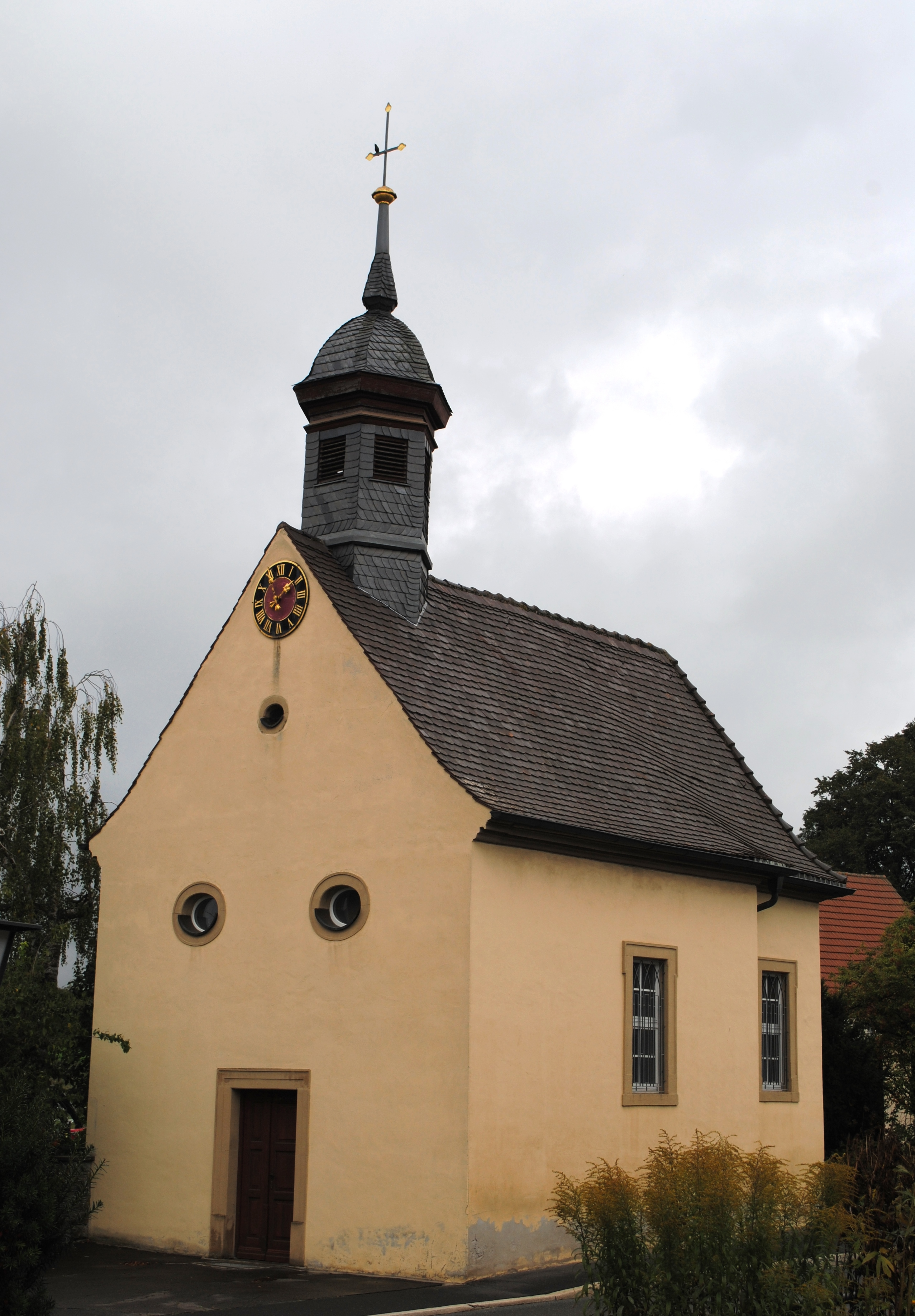 Filialkirche St. Michael, Neuses am SandThis is a photograph of an architectural monument.